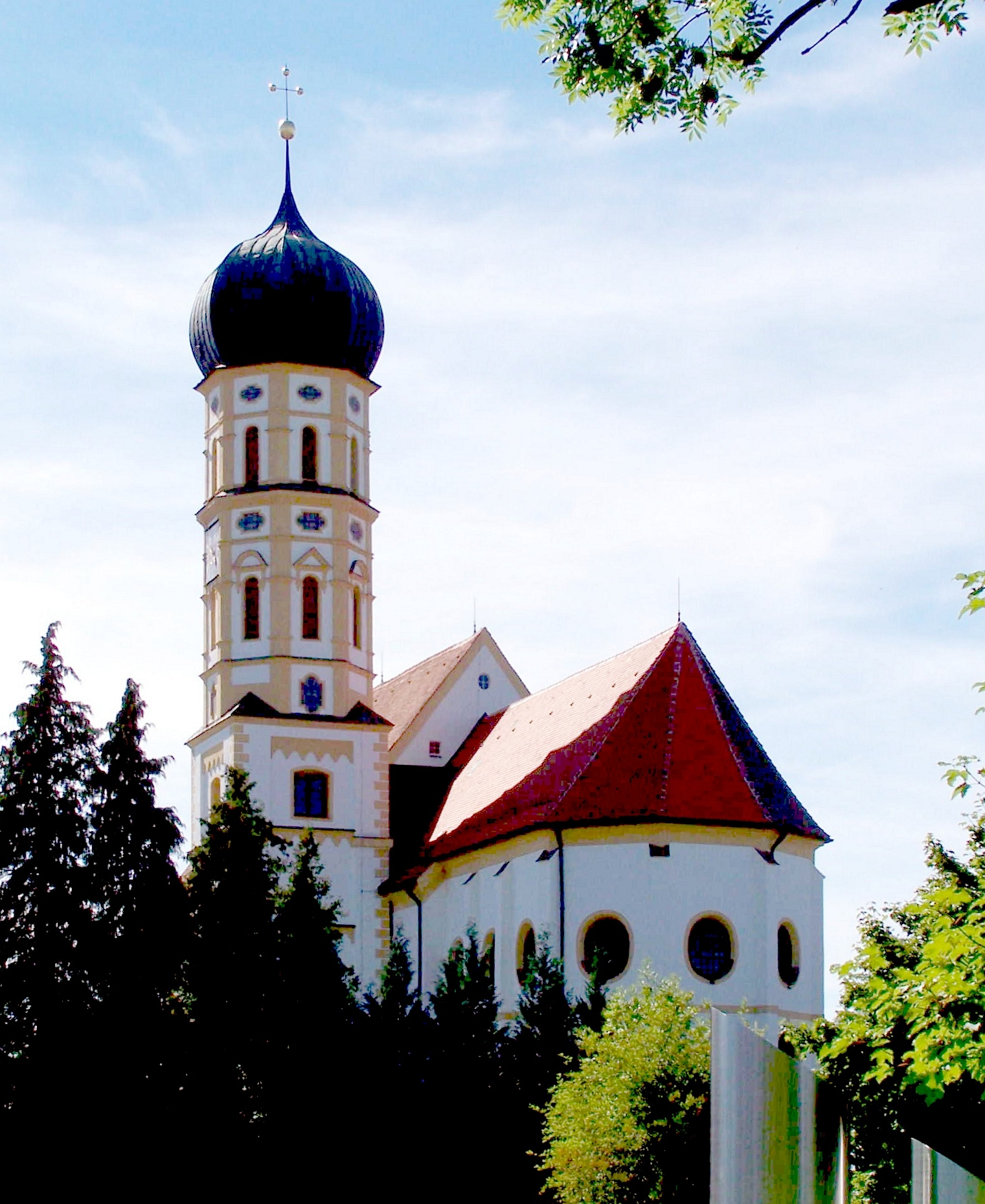 Marktoberdorf, Kath. Stadtpfarrkirche St. Martin